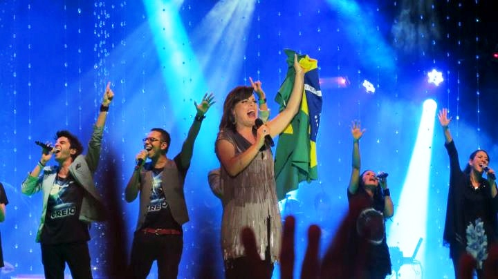 Palco do DT 15, gravado em Manaus com os integrantes do Diante do Trono.